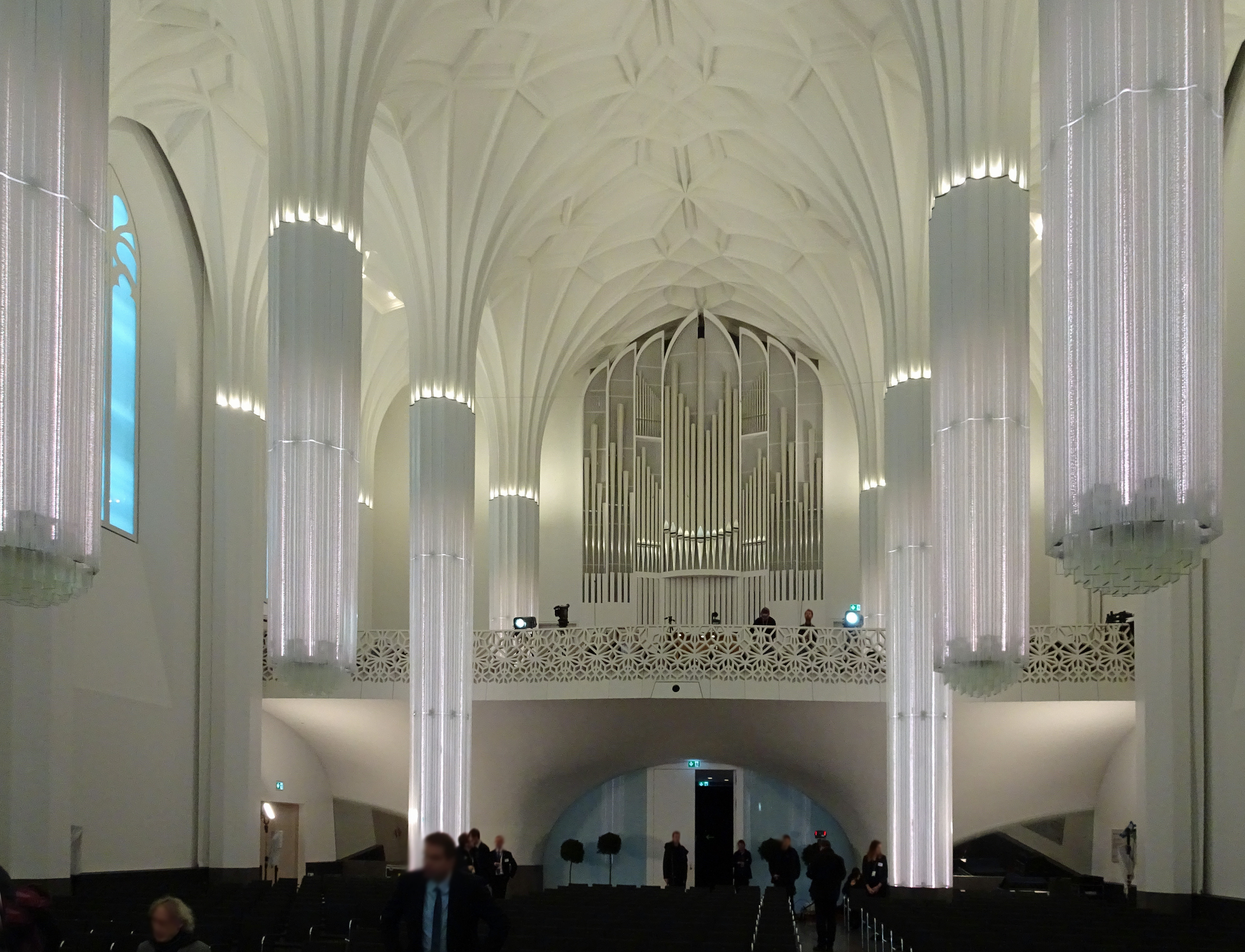 Blick zur Jehmlich-Orgel in der Leipziger Universitätskirche